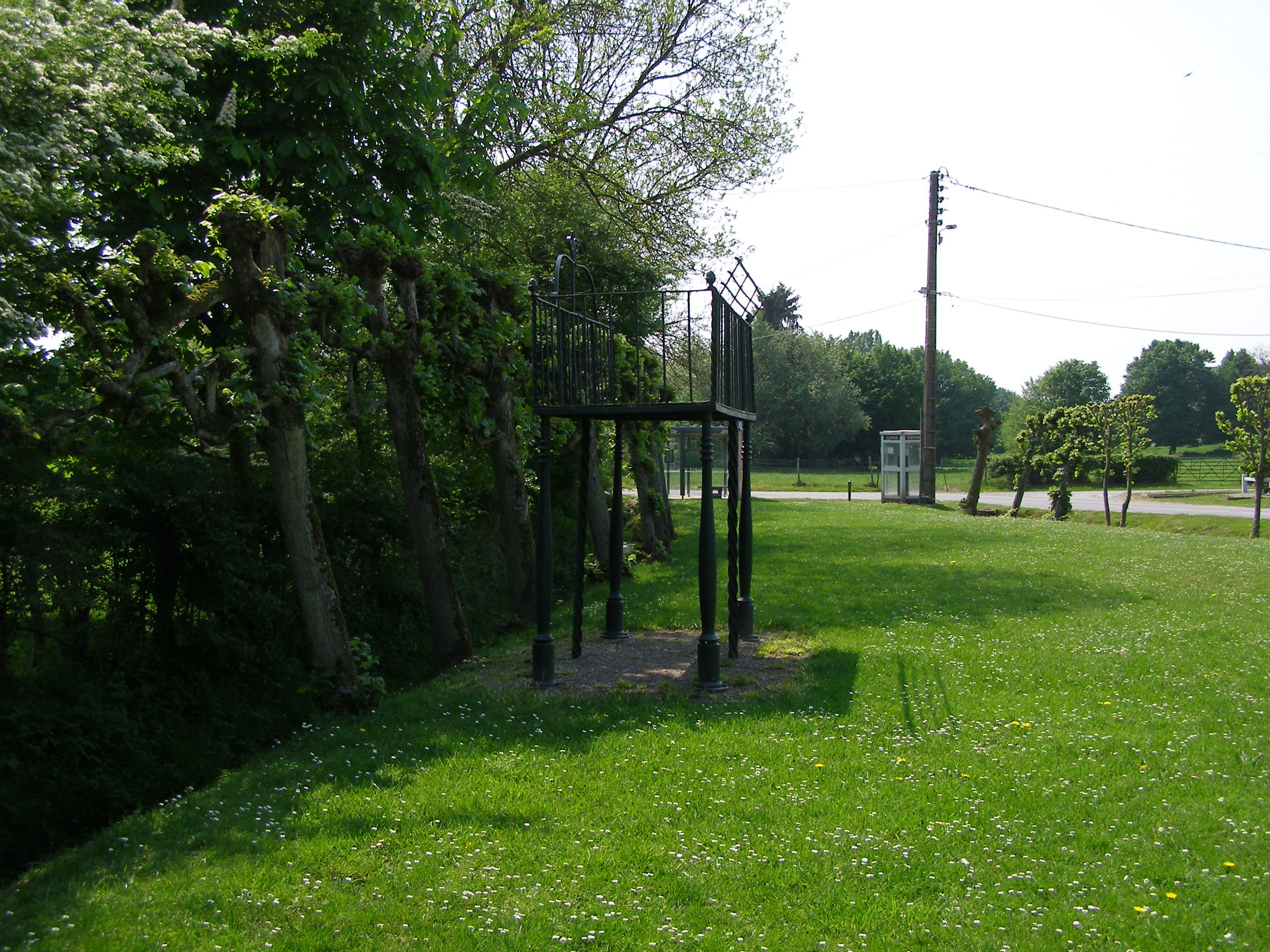 Ancien kiosque à musique.